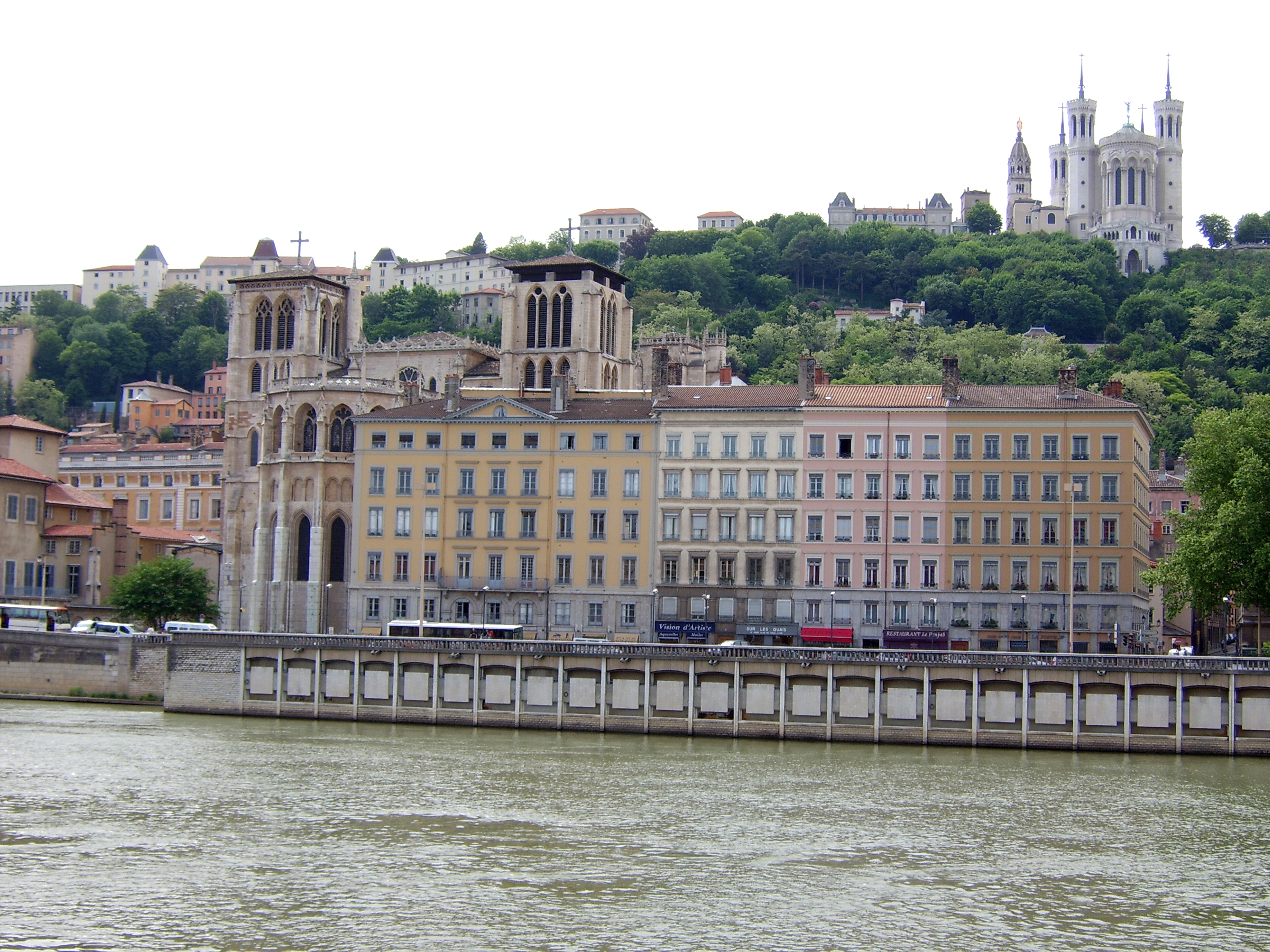 Die Cathedrale St-Jean und die Basilica Notre Dame de Fourvière vom Ufer der Saône